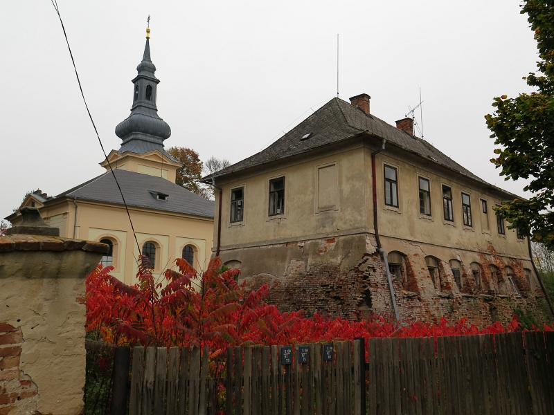 Kostel svatého Jiljí s farou, Křinec 9, náves, Křinec.